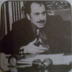 علی عبده (۱۳۵۸-۱۳۰۳)